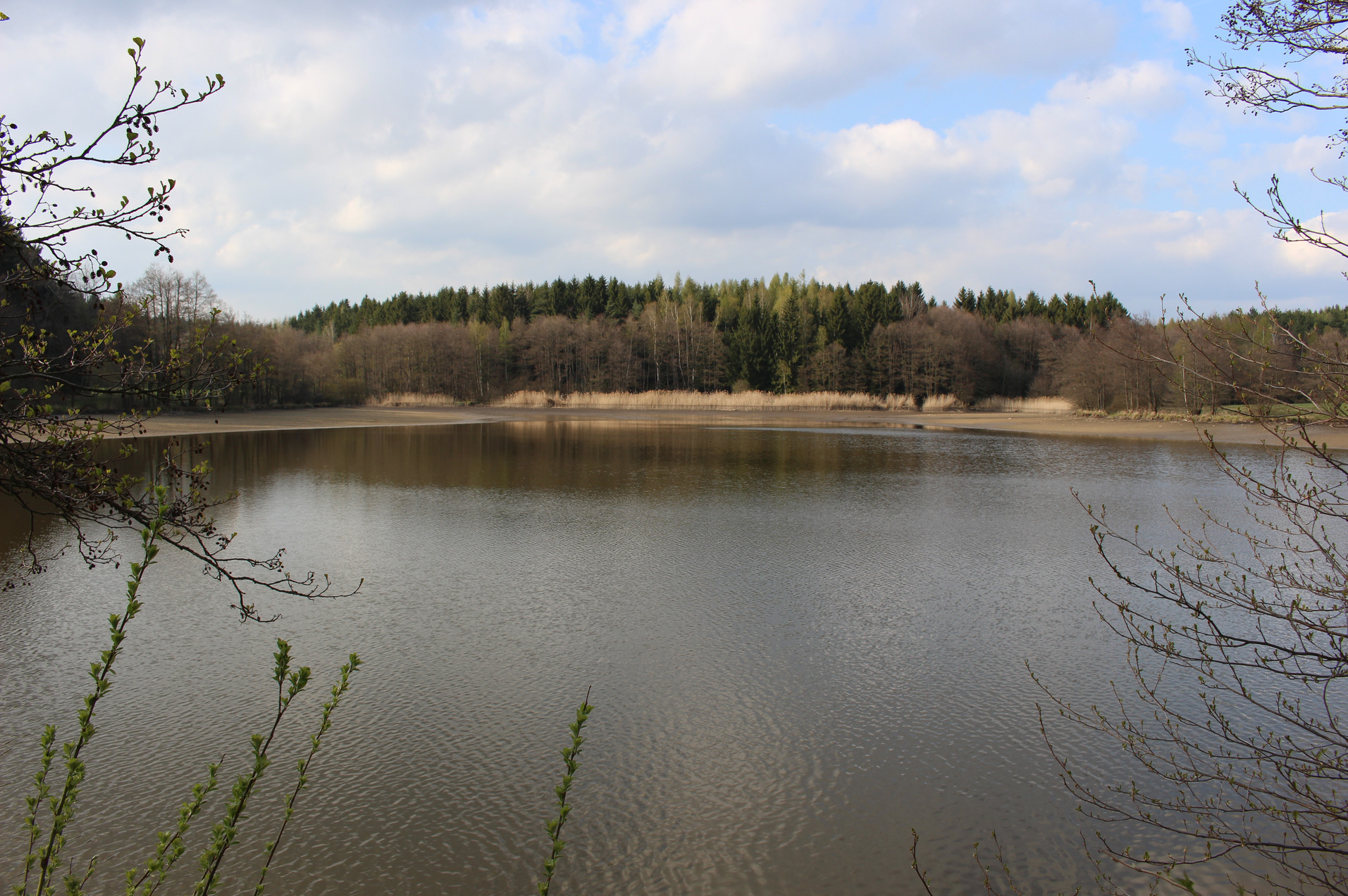 přírodní památka Hodíškovský rybník, okres Žďár nad Sázavou, Kraj Vysočina